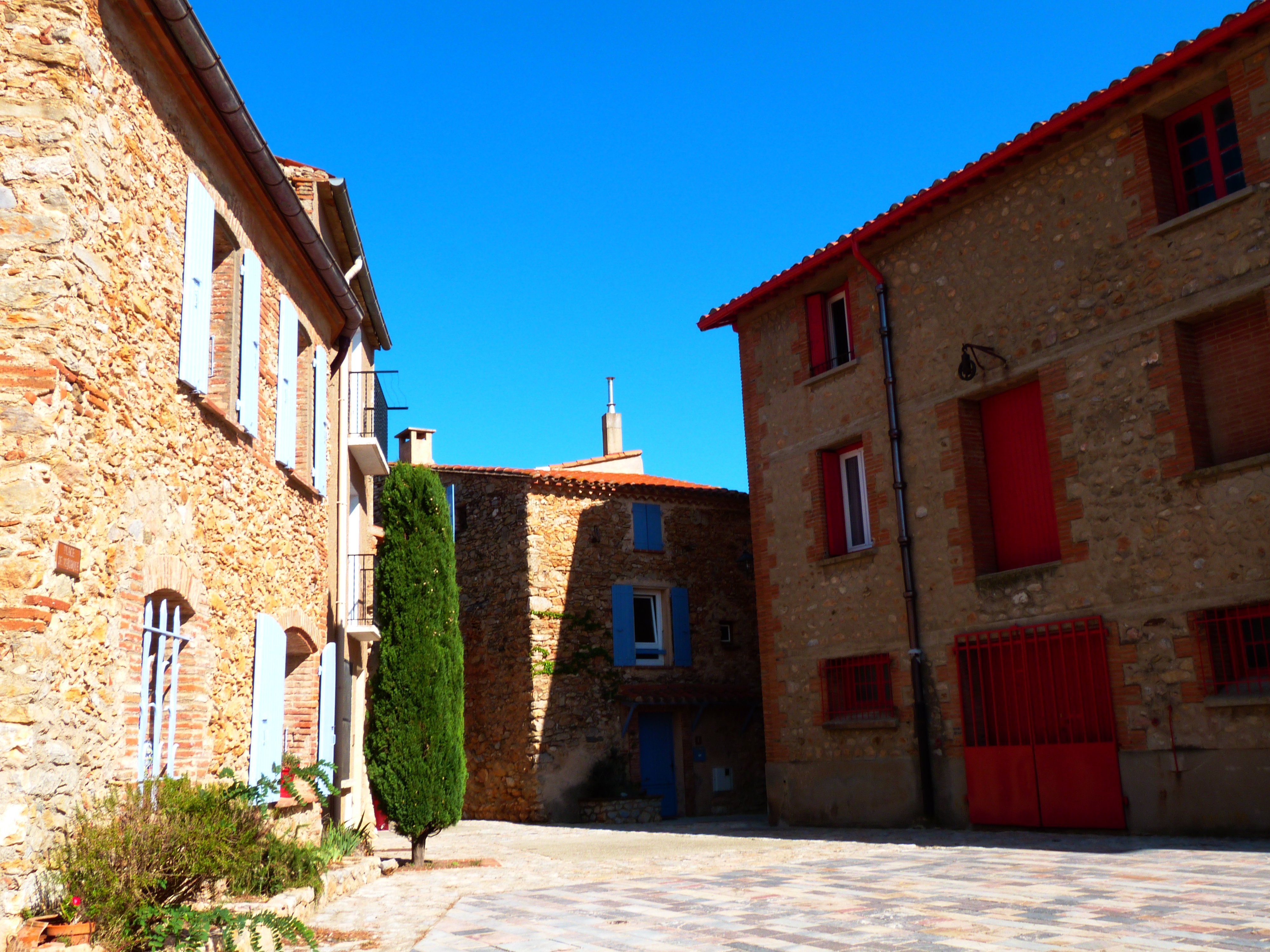 Place proche de l'église à Sainte-Colombe-de-la-Commanderie